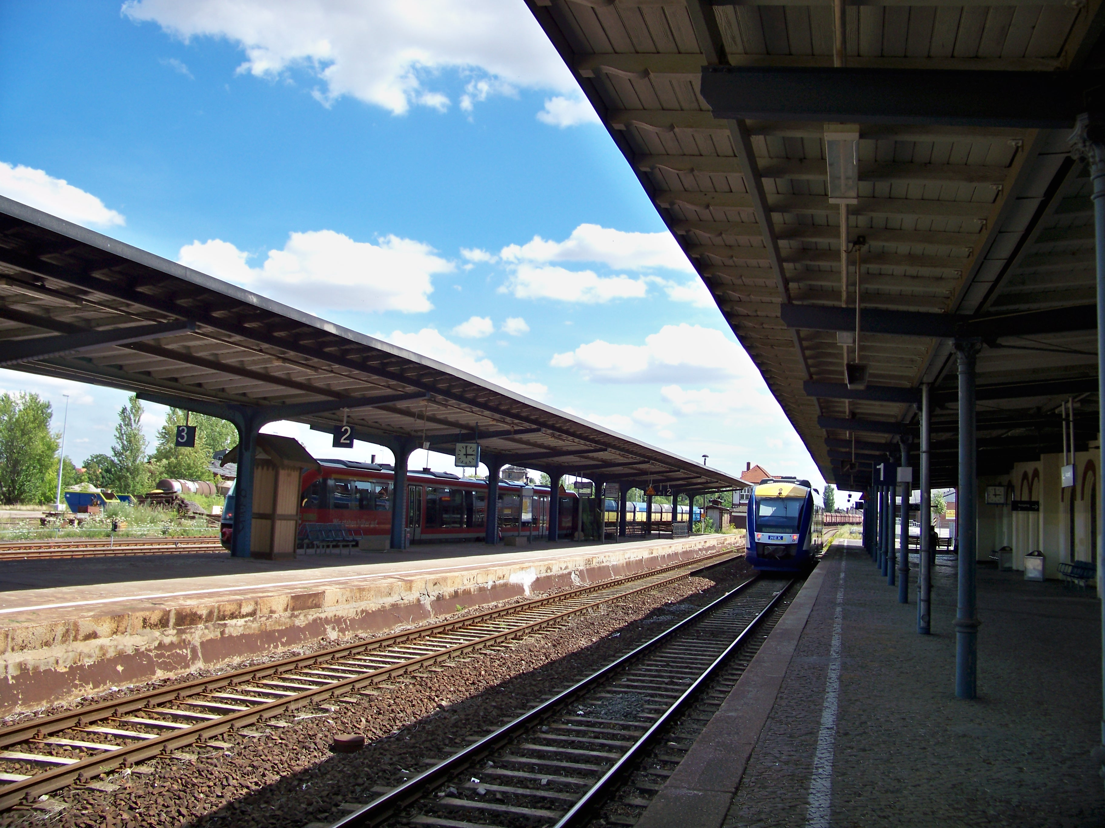 Bahnsteige des Bahnhofs Bernburg (Saale)